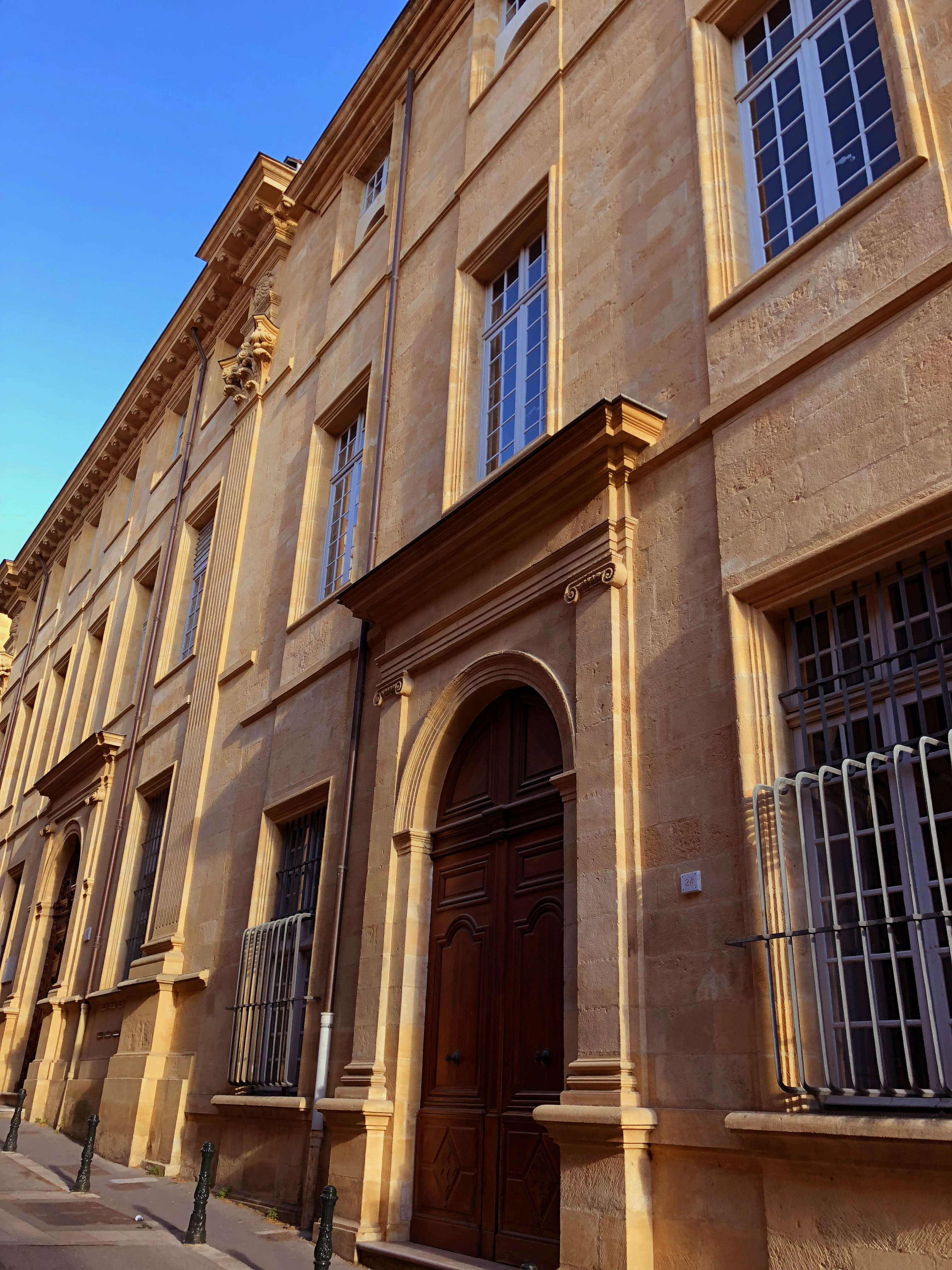 Façade de l'hôtel Arlatan, 24 rue de l'opéra 13100 Aix en Provence